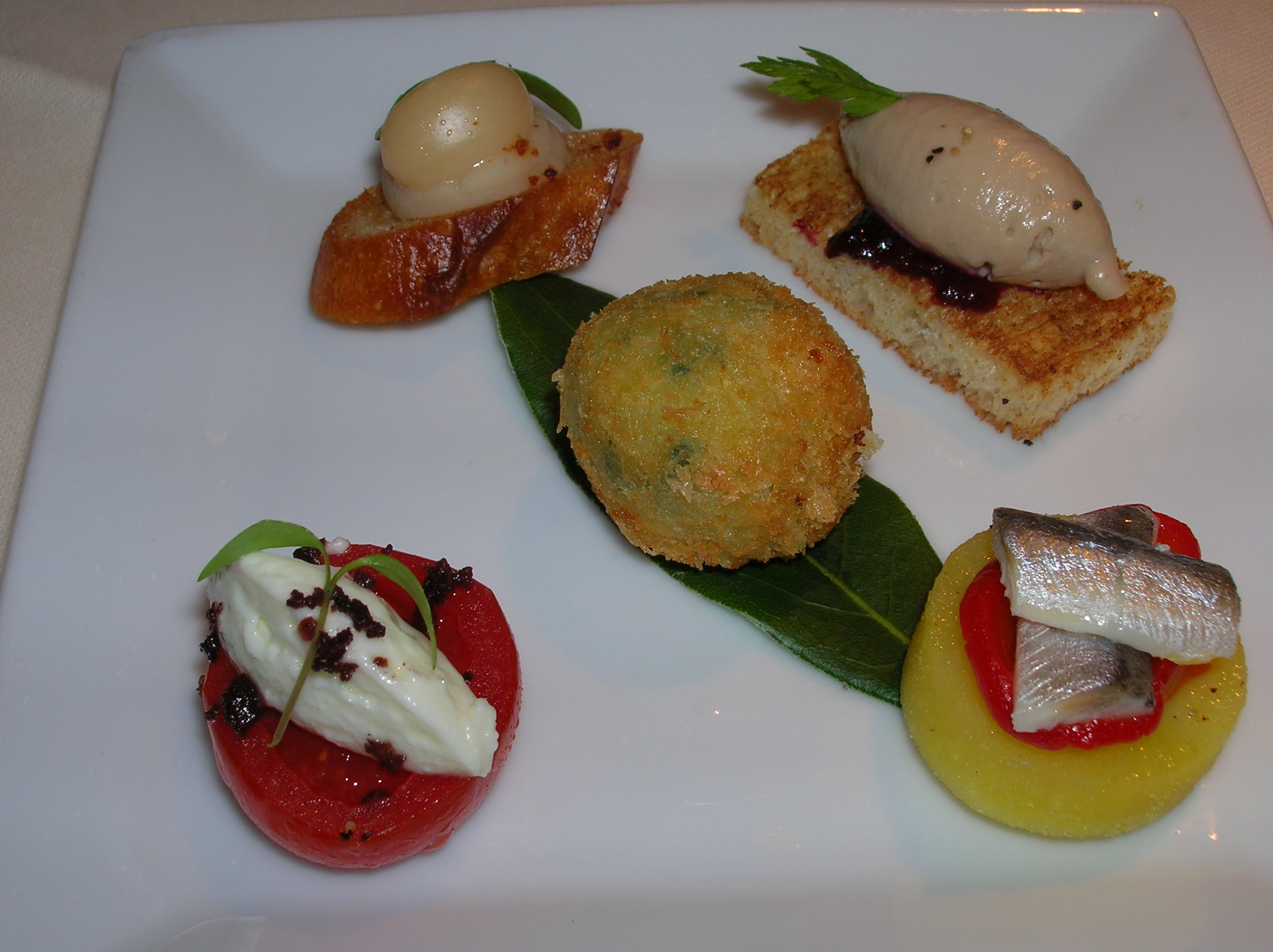 לה מנואר או קואט סזון